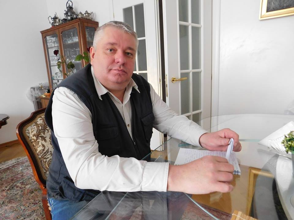 редактор віктор тригуб